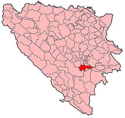 Općina Trnovo (FBiH) u Bosni i Hercegovini.